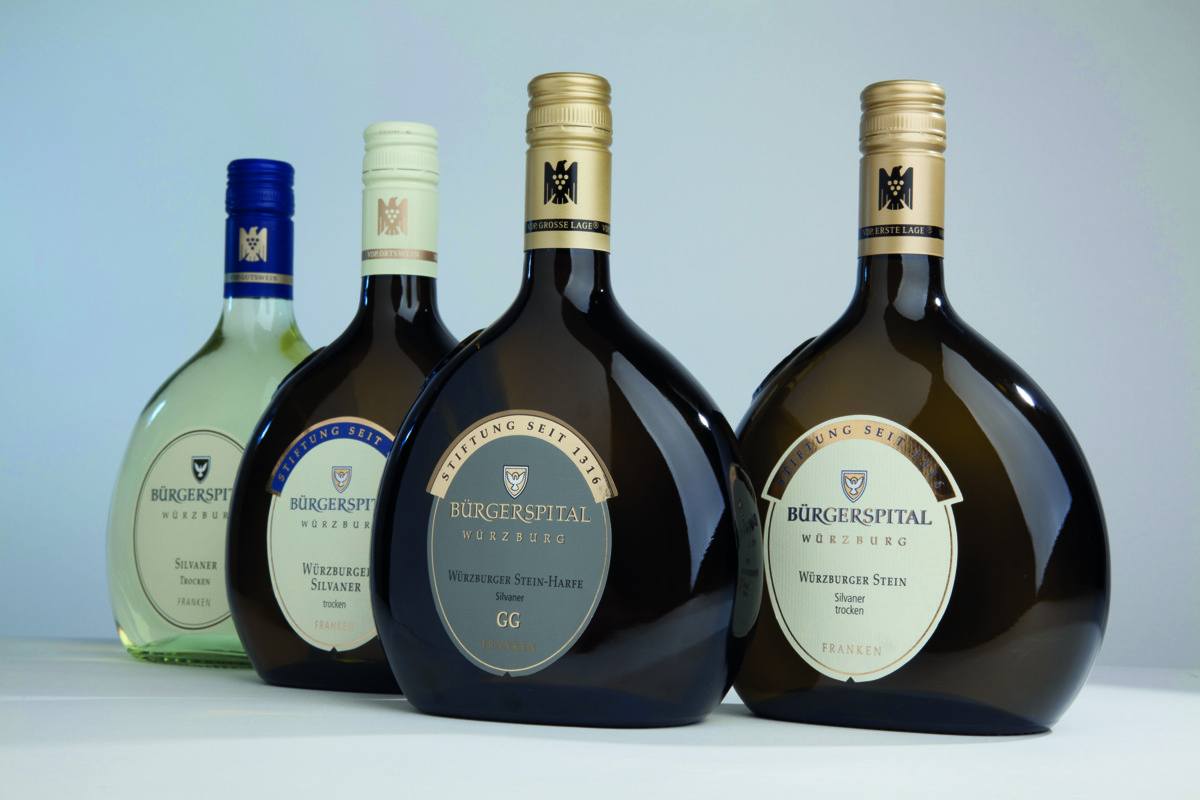 Bürgerspital-Weine